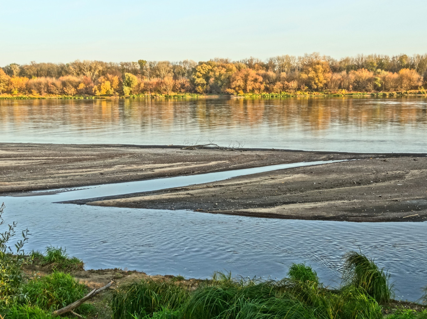 Wisła w Bydgoszczy - Fordonie